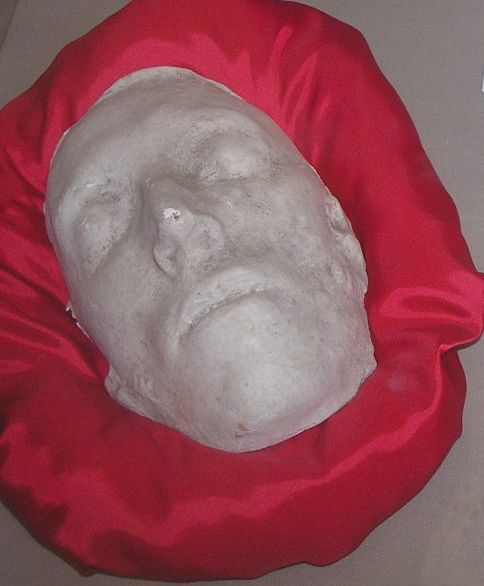 Robert Emmet's death mask. Taken by Storkk in Kilmainham Gaol, Dublin, Ireland.